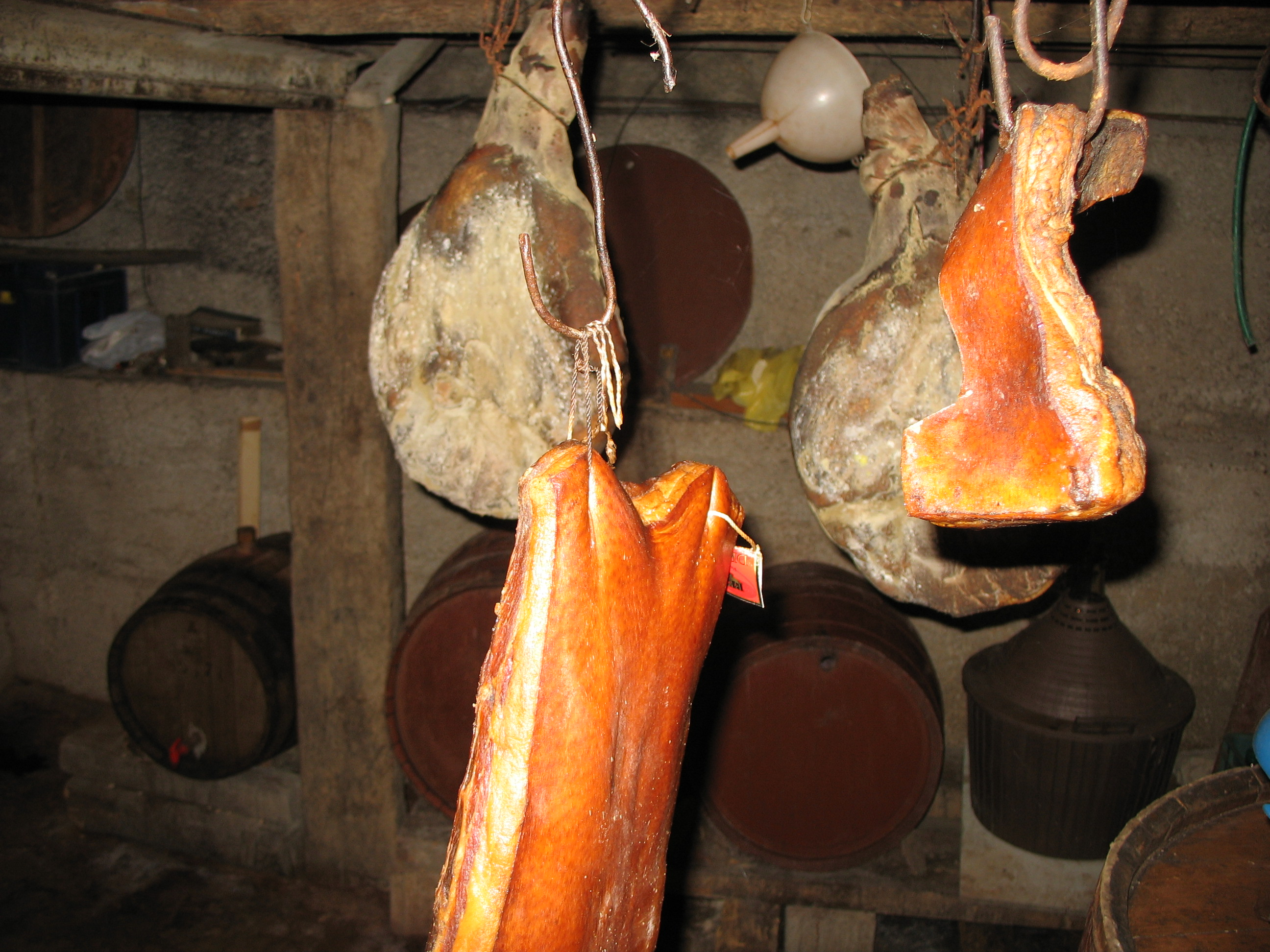 Seoski proizvodi u Kričkama kod Drniša.